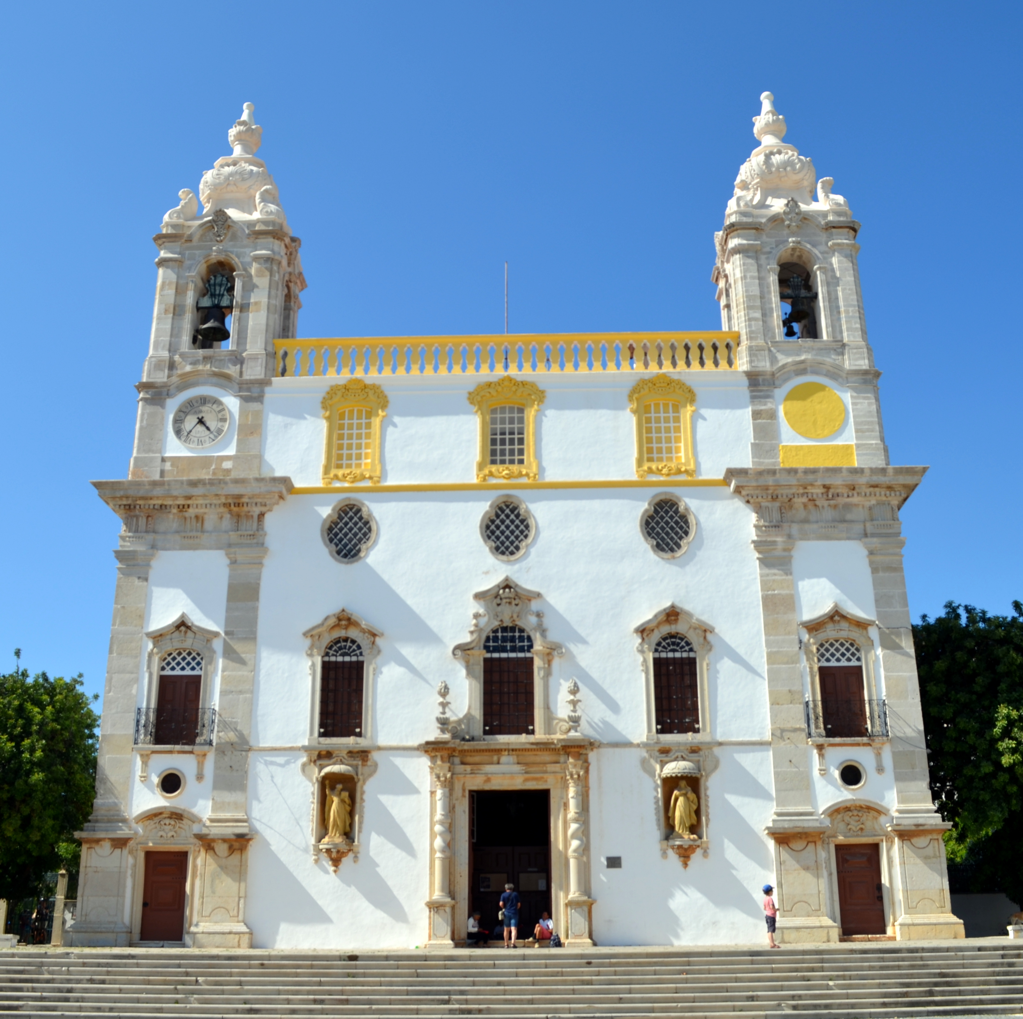 Igreja da Ordem Terceira de Nossa Senhora do Monte do Carmo.